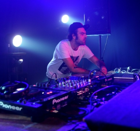 Live Dj Set performance